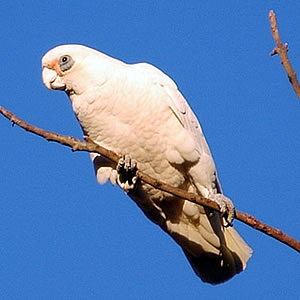 Bird, Little Corella, Cacatua sanguinea